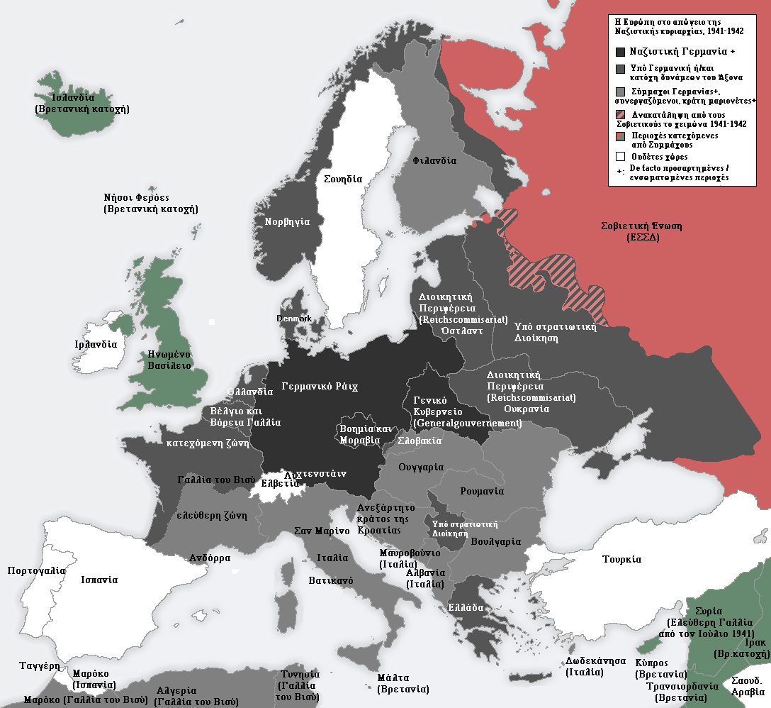 Η Ευρώπη στο απώγειο της Ναζιστικής Γερμανίας